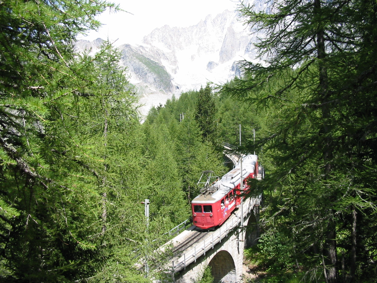 Chemin de fer du Montenvers, Haute-Savoie, France, 2003-07